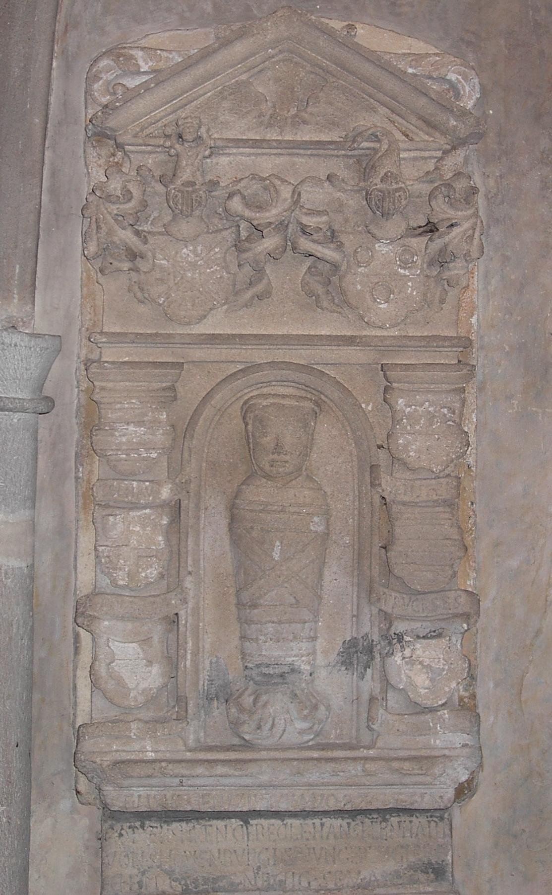 Grafsteen an der Klierwer Kapell vun der Munzer Kierch. Photo vum User Pear 15:56, 20 August 2006 (UTC). Munzen Kategorie:Gemeng Munzen